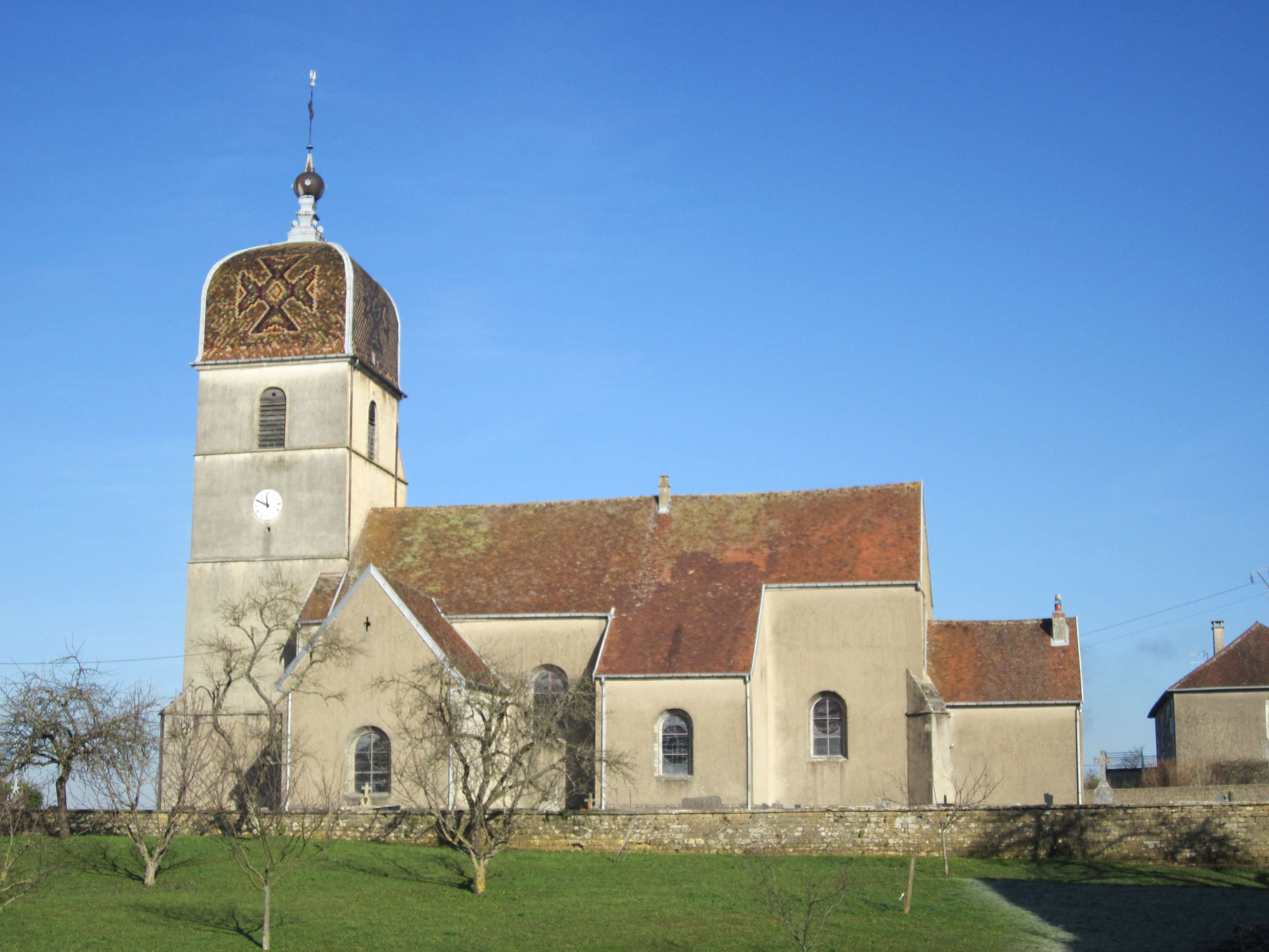 Montholier (département du Jura – France) : église du XVIIe siècle célèbre pour son clocher franc-comtois à croix de Malte.